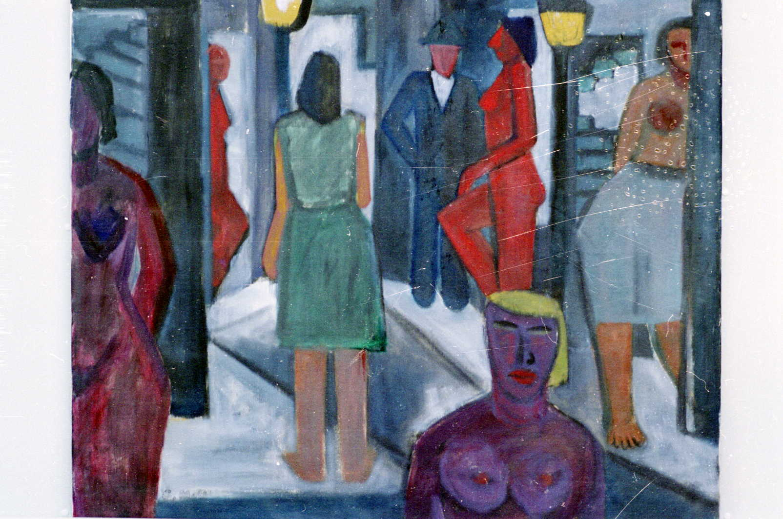 Titel: Mulackstrasse